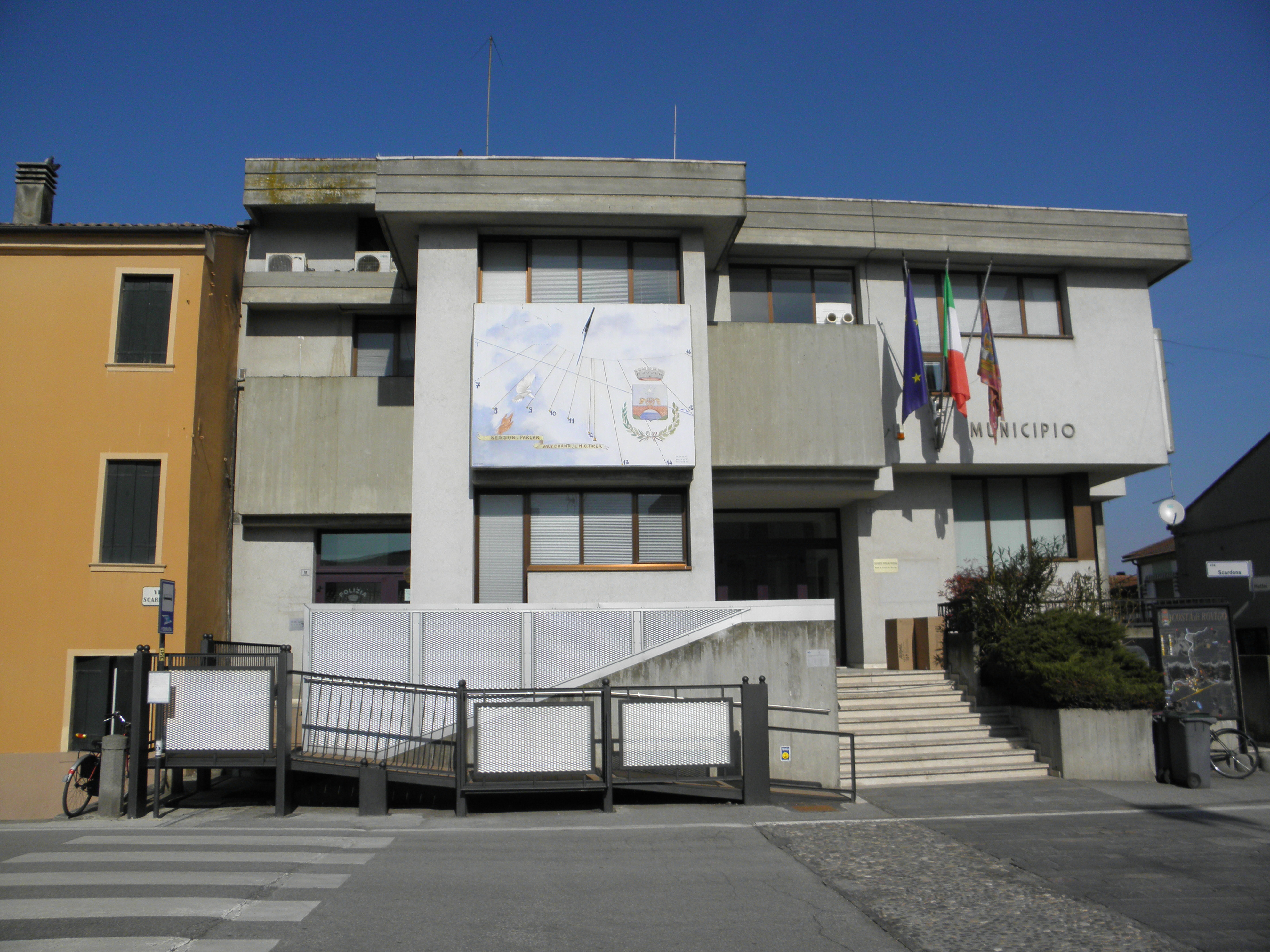 Costa di Rovigo: la palazzina sede del municipio.